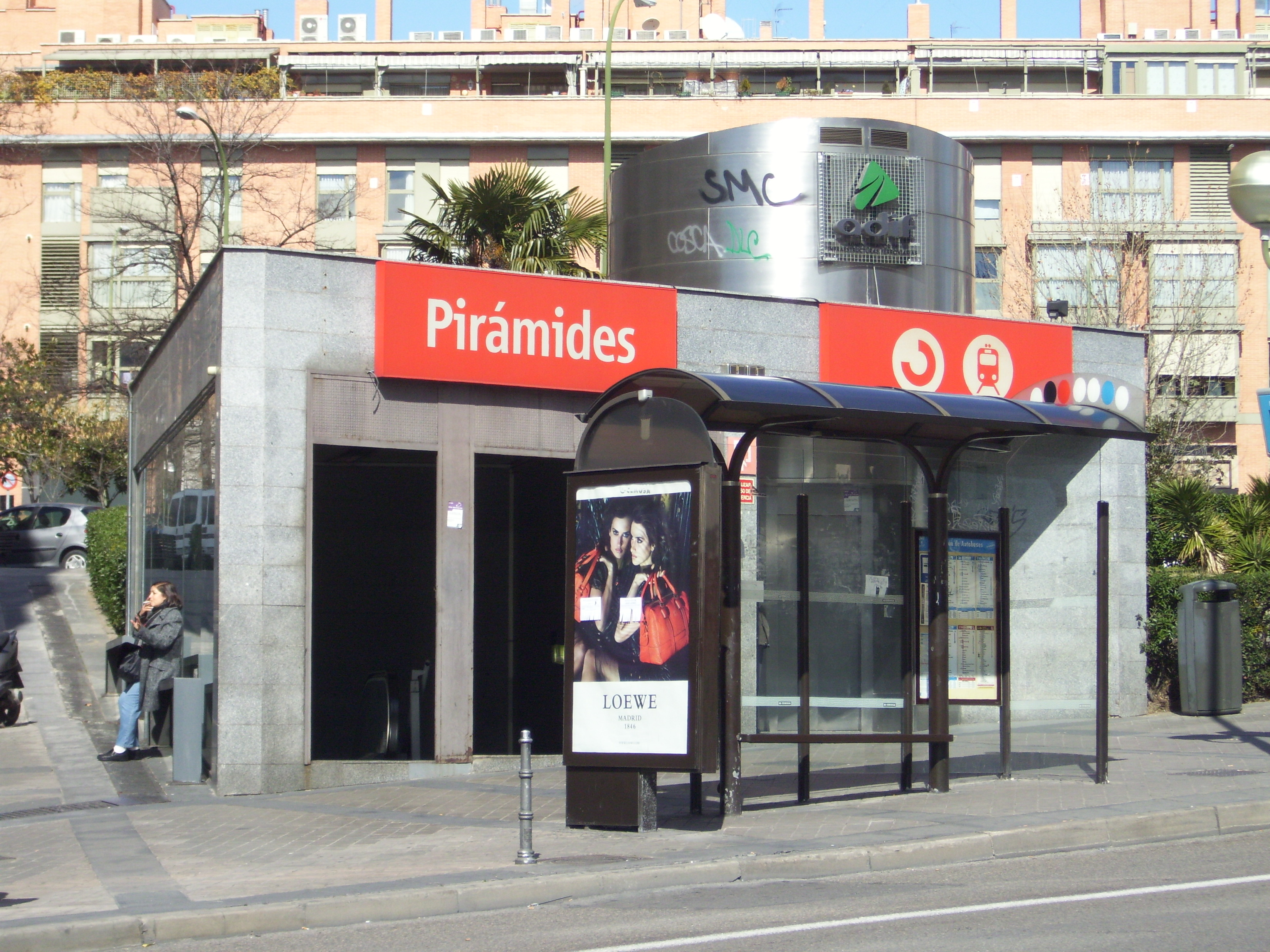 Pirámides (metropolitana di Madrid)